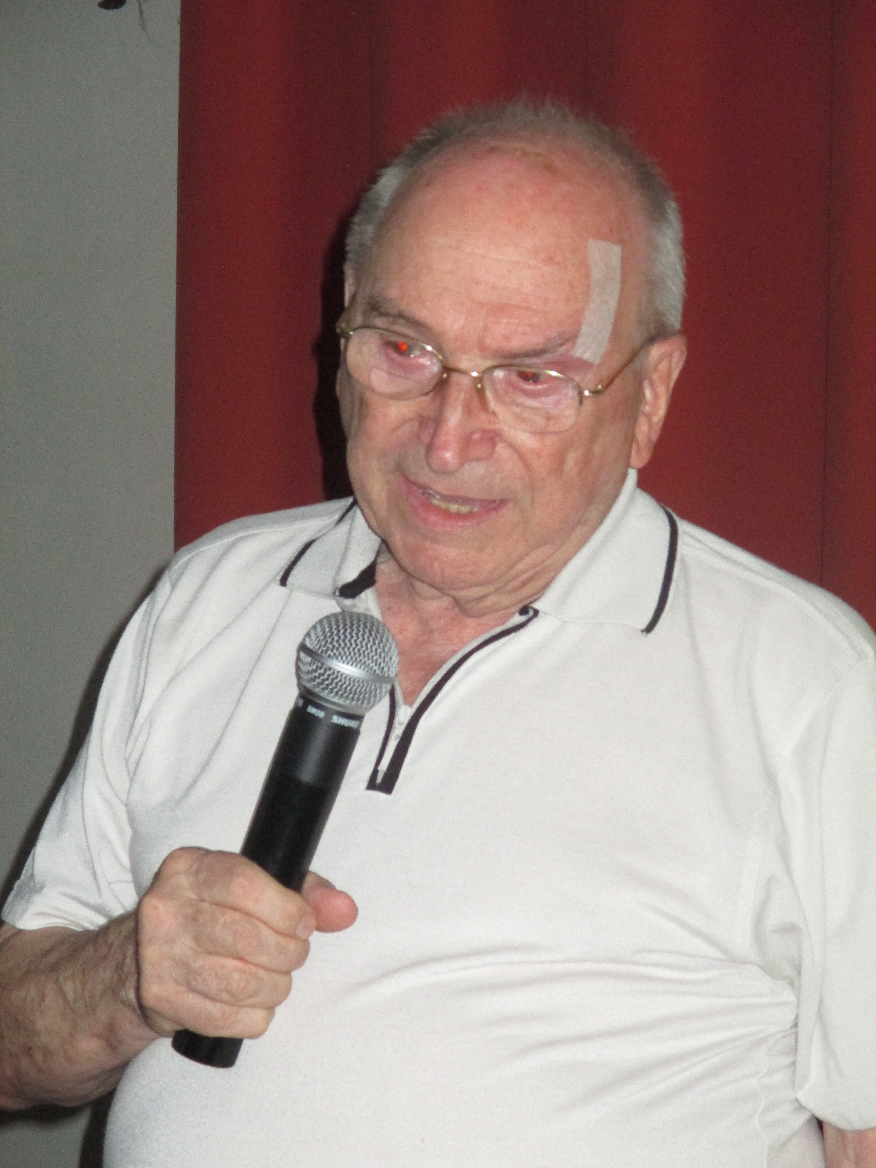 Pierre Accoce-Capar (Urdatx / Santa Grazi, 1928) ARSIP 50 urteurreneko bileran (Areta, 2016)